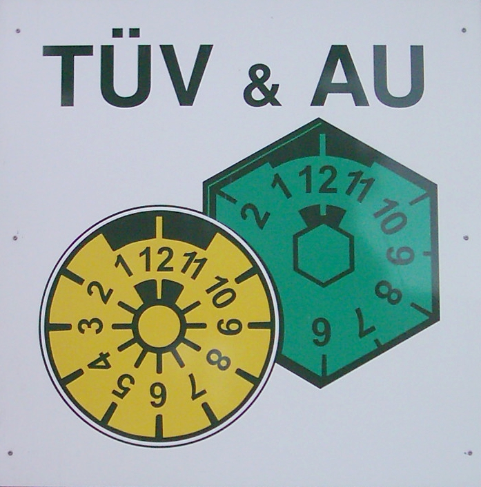 Tafel für TÜV- und AU-Untersuchung an einer Kfz-Werkstatt in Hamburg-Wandsbek.